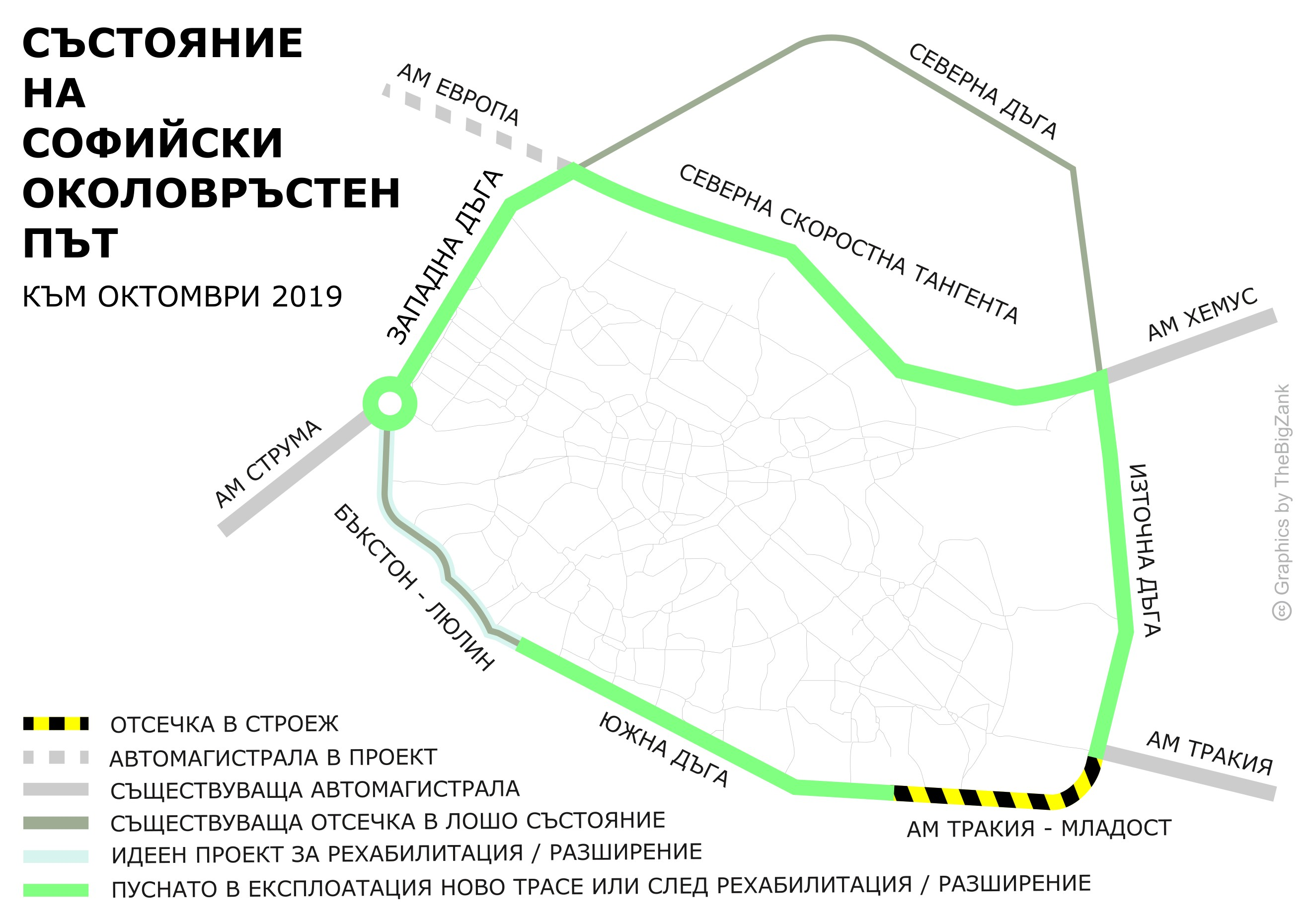 Инфографика на ориентировъчният прогрес при рехабилитацията на СОП